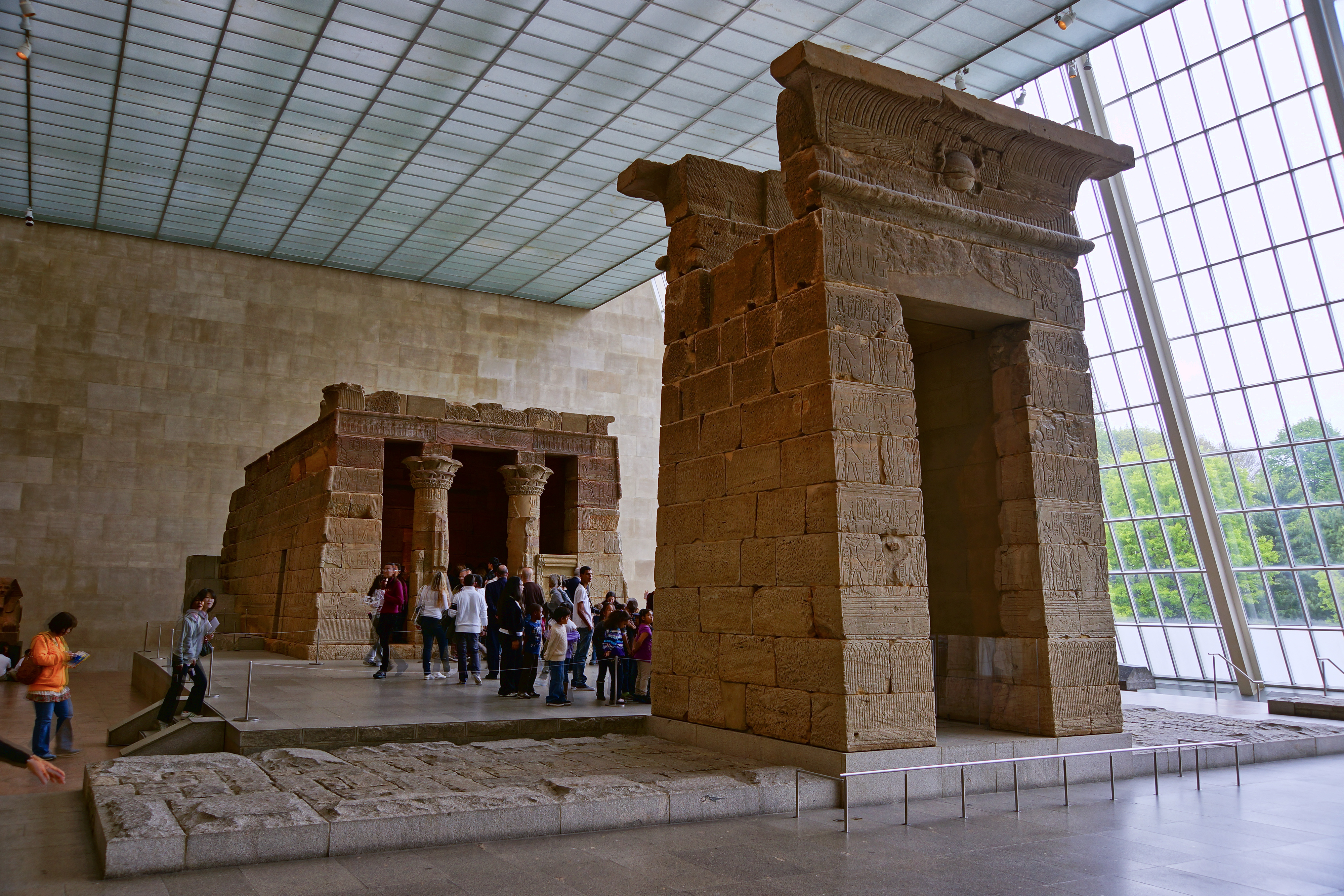 NYC - Metropolitan Museum - Temple of Dendur